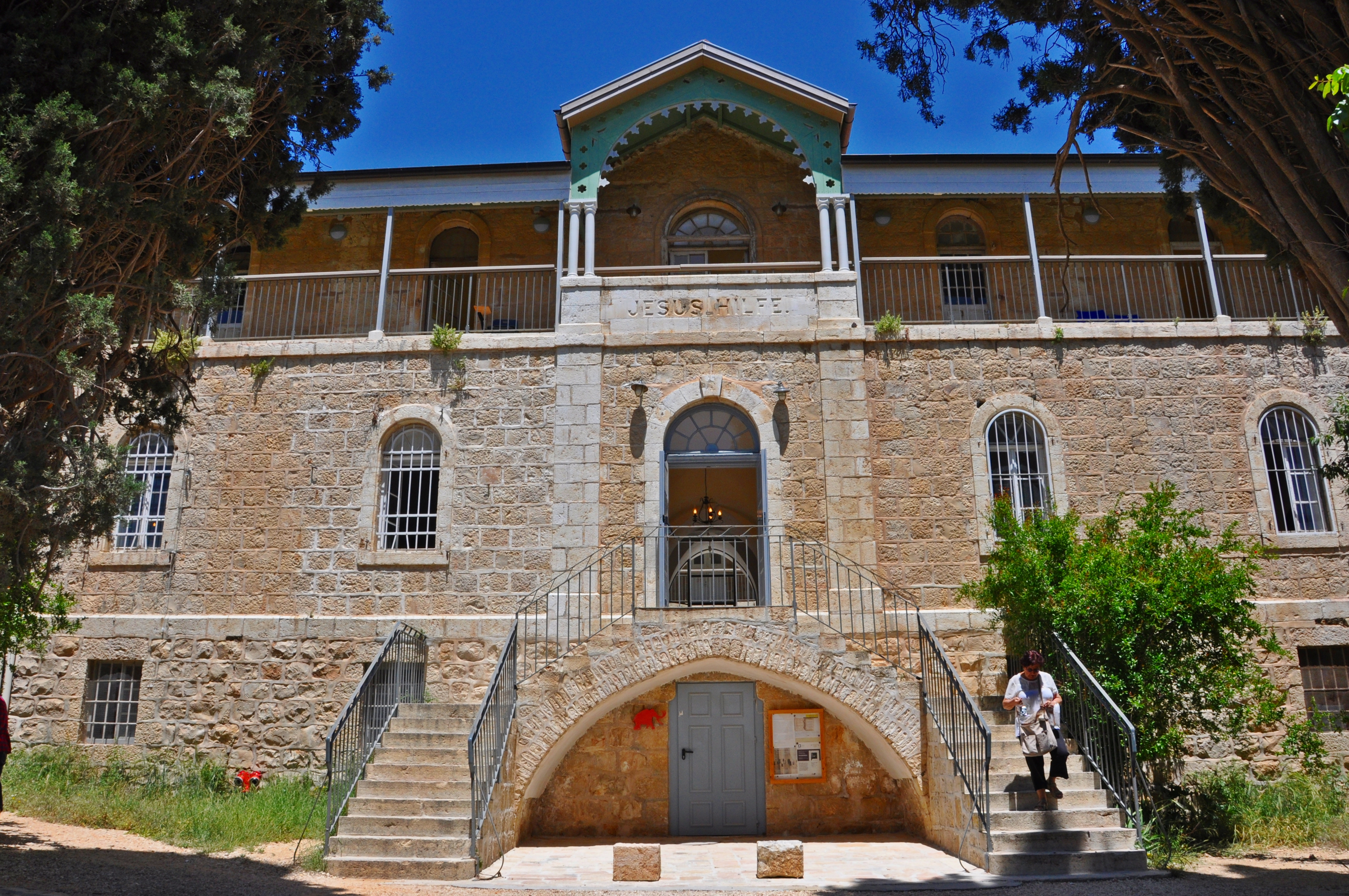 בית החולים הממשלתי ע"ש הנסן (בעבר בית החולים למצורעים עזרת ישו) היה מרכז טיפולי לחולים במחלת הנסן (צרעת) בשכונת טלביה. עד 2002 פעל כמרפאת חוץ, ושיכן את המרכז הארצי למחלת הנסן של משרד הבריאות. במקום מוזיאון על היסטוריית בתי החולים בירושלים.